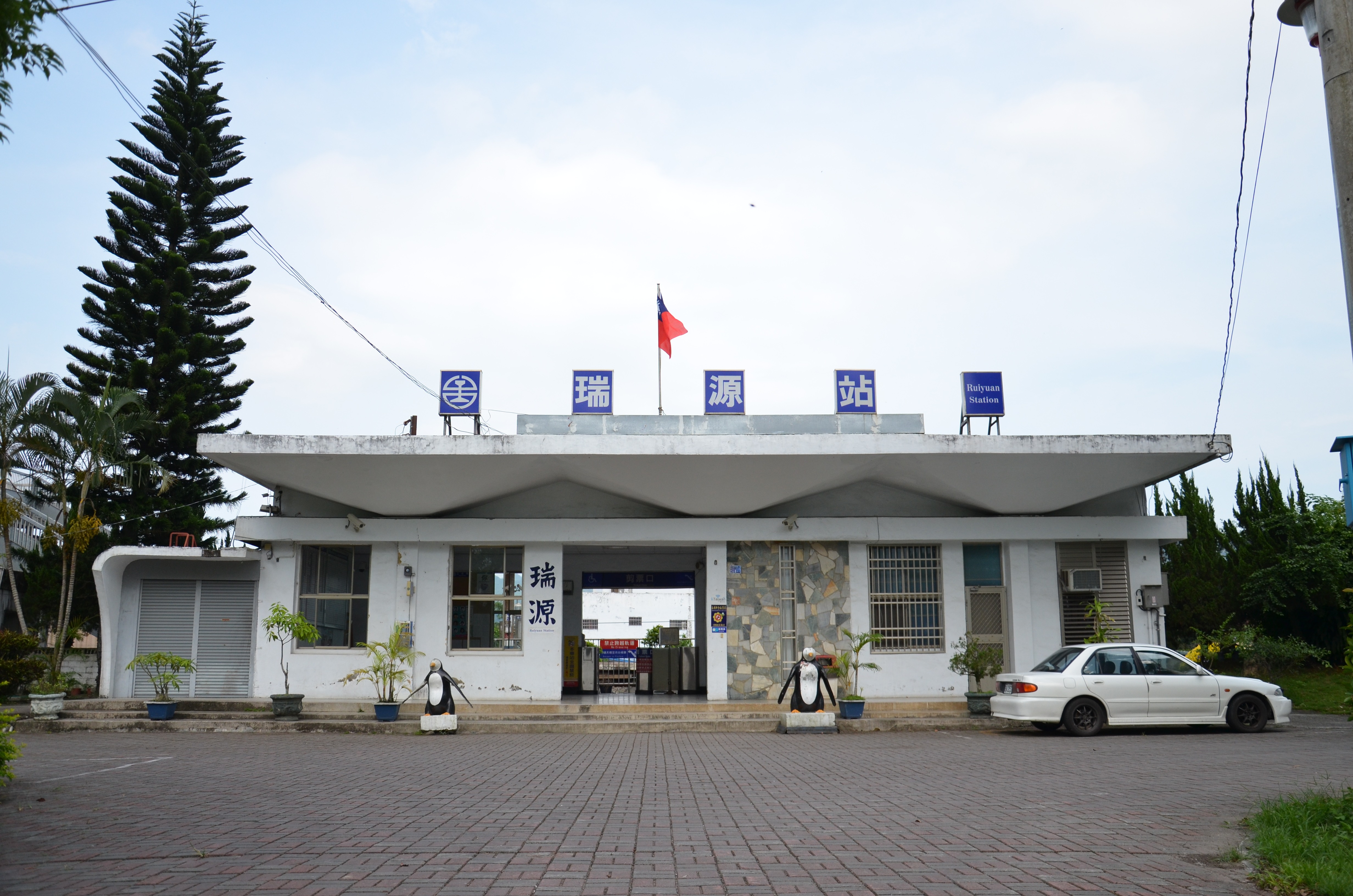 中文（台灣）: 臺灣鐵路管理局瑞源車站站體。